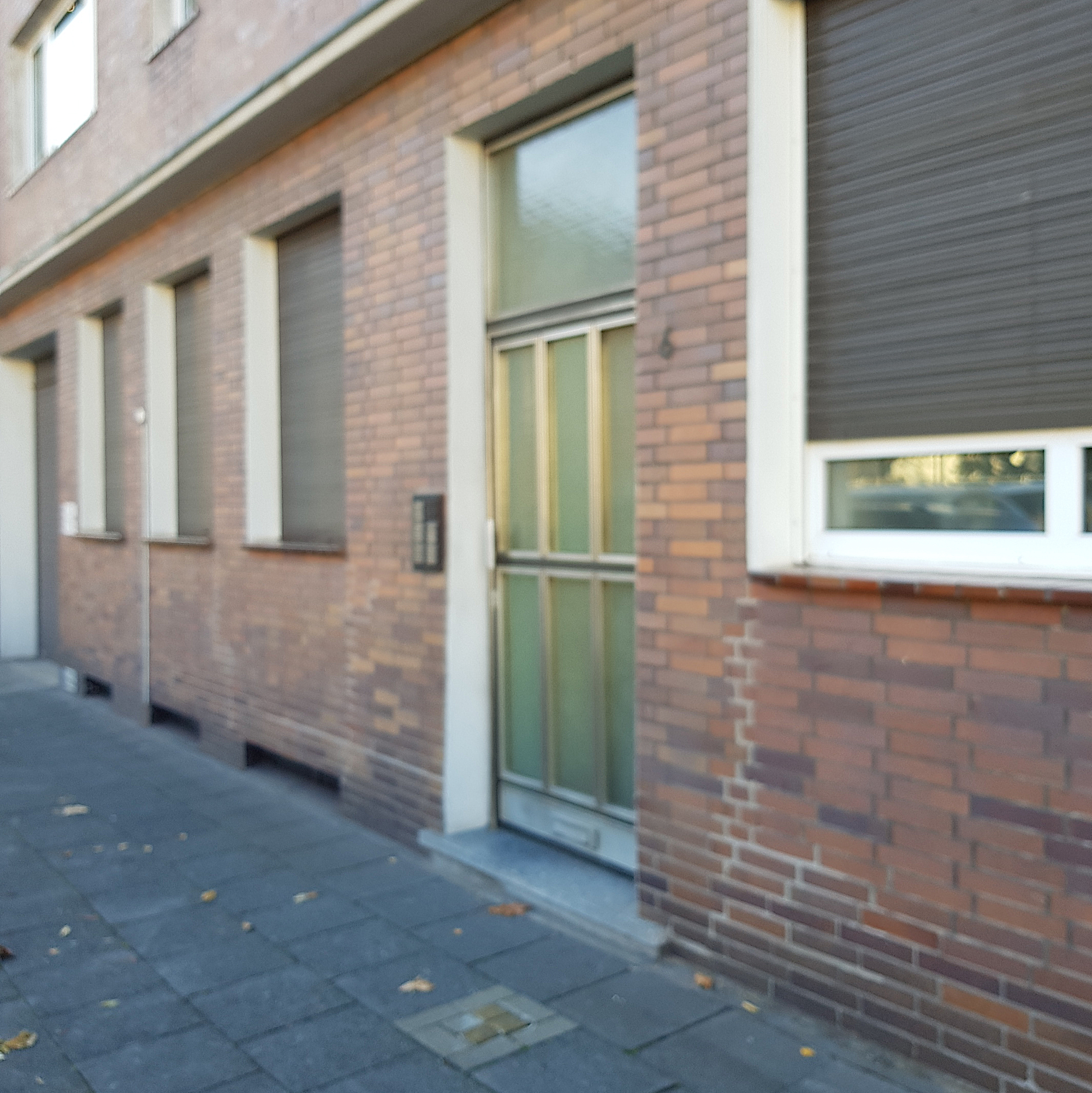 Ort der Stolpersteine für Paula, Berthold und Heinz Meyer